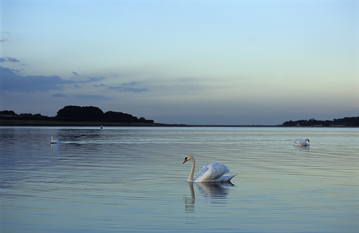 Fin de journée sur le réservoir de Rutland water en Angleterre